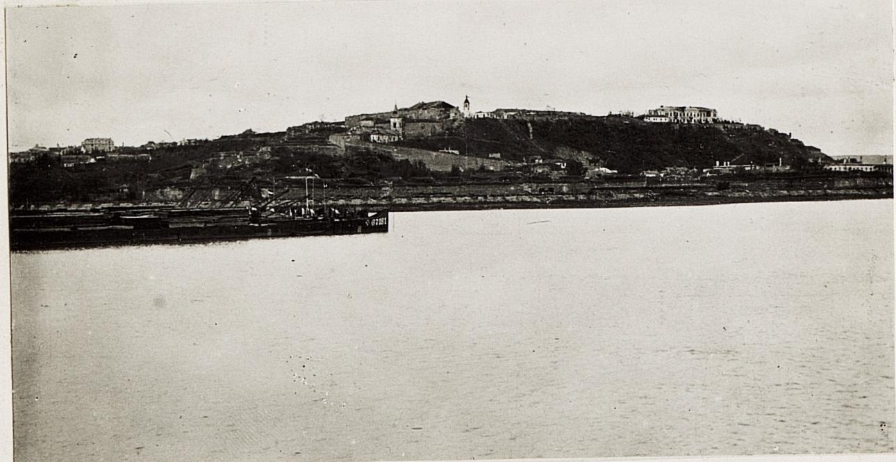 Belgrad.